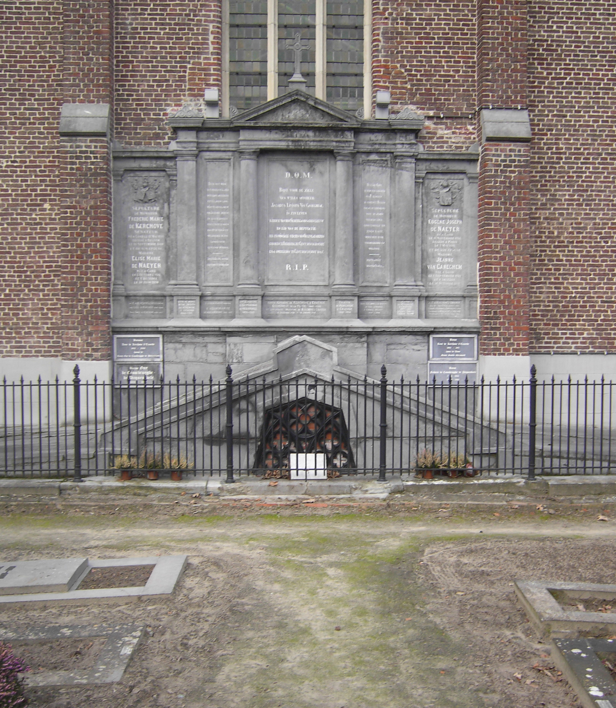 Grafmonument Lieven Jacob van Caneghem en zijn nakommelingen op het kerkhof van Bellem - Aalter - Oost-Vlaanderen - Vlaanderen - België